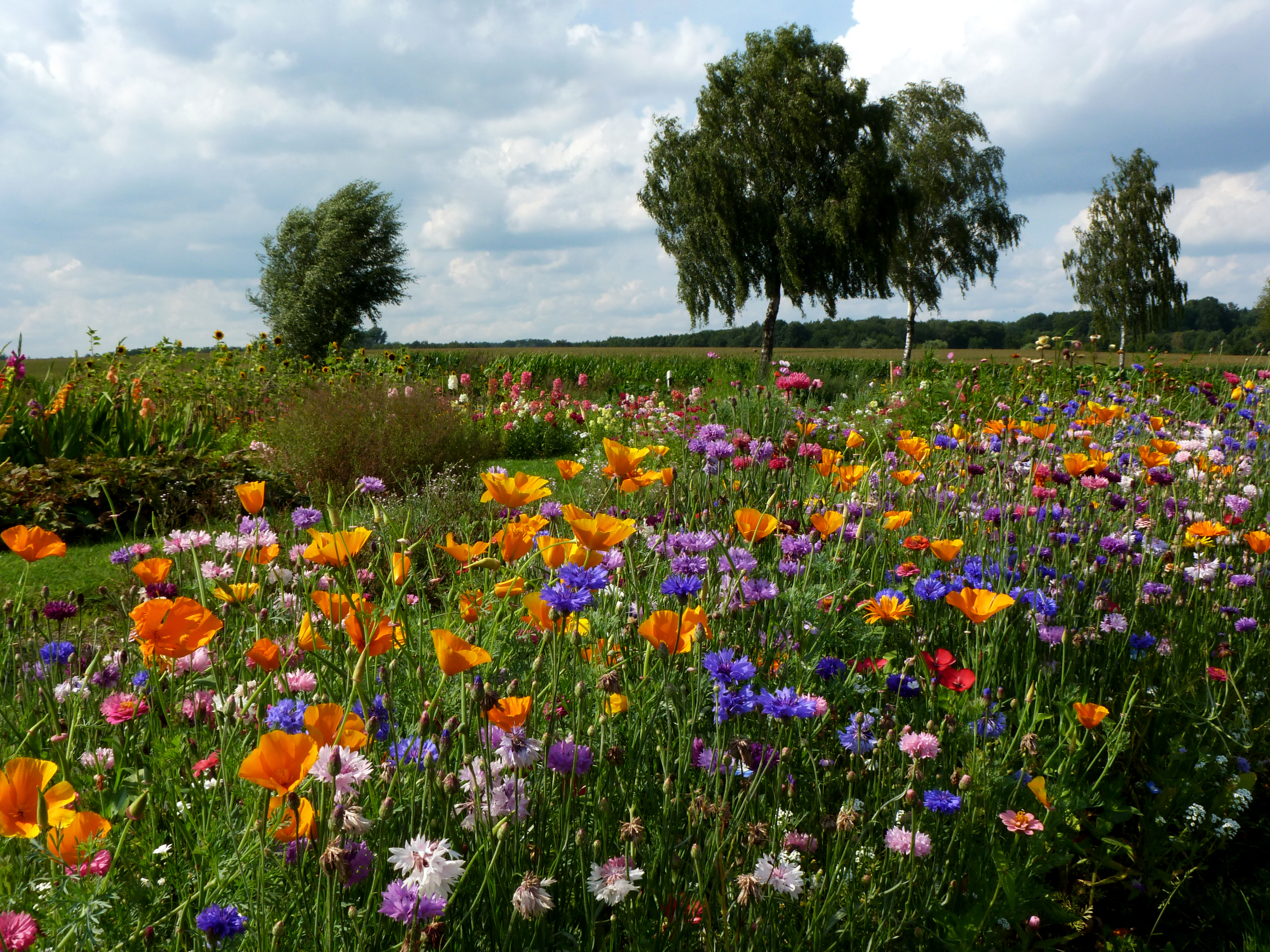 Sommerliches Blumenfeld auf Bauer Riggert's Hof in Eimke, Niedersachsen, DE.